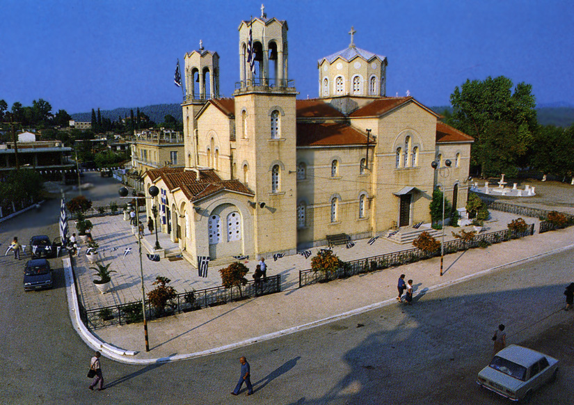 Храм святого праведного Иоанна Русского в Нео-Прокопионе, Эвбея, Греция